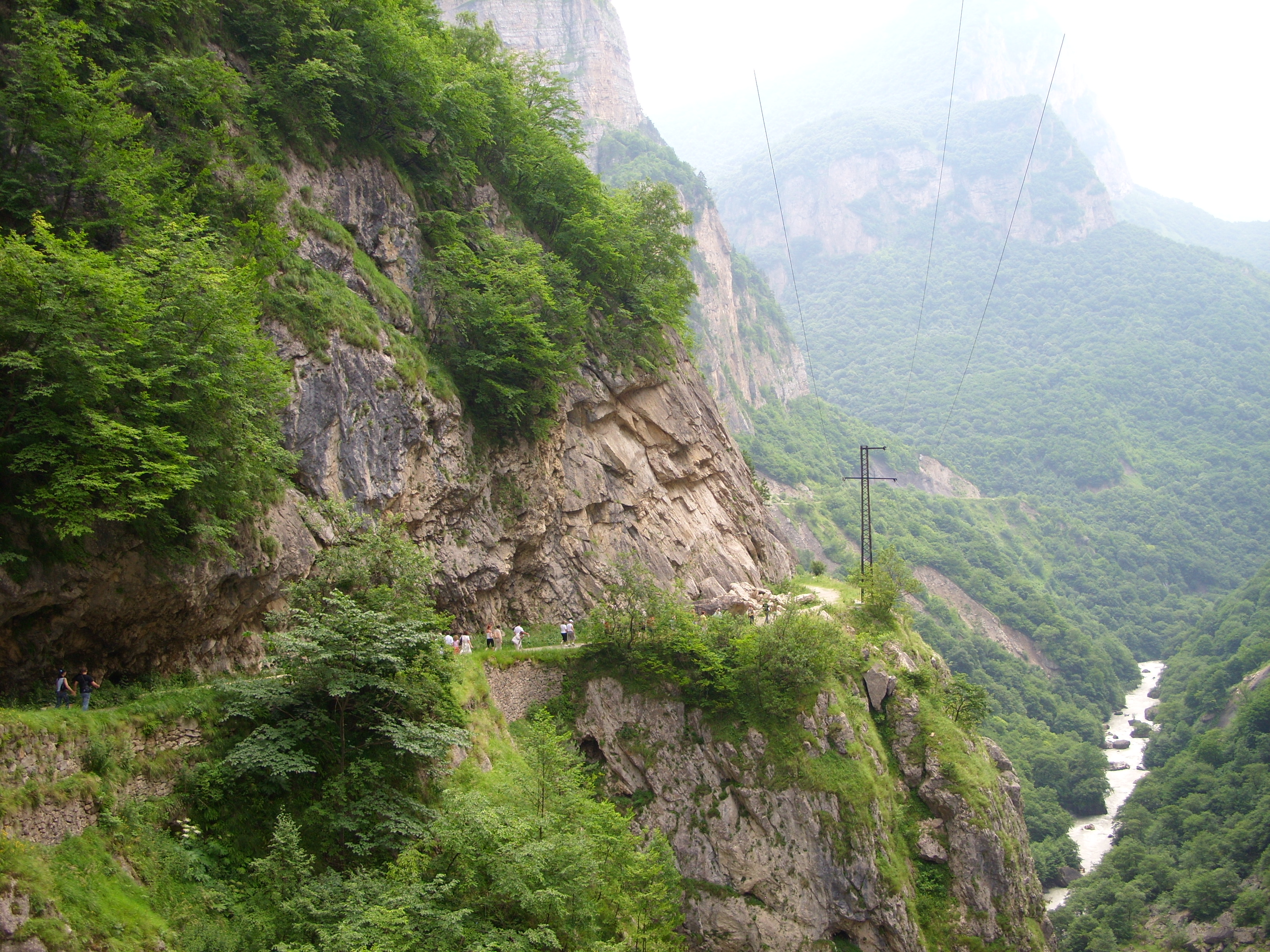 Снимки сделаны во время автобусной экскурсии из Железноводска, июль 2009 г.